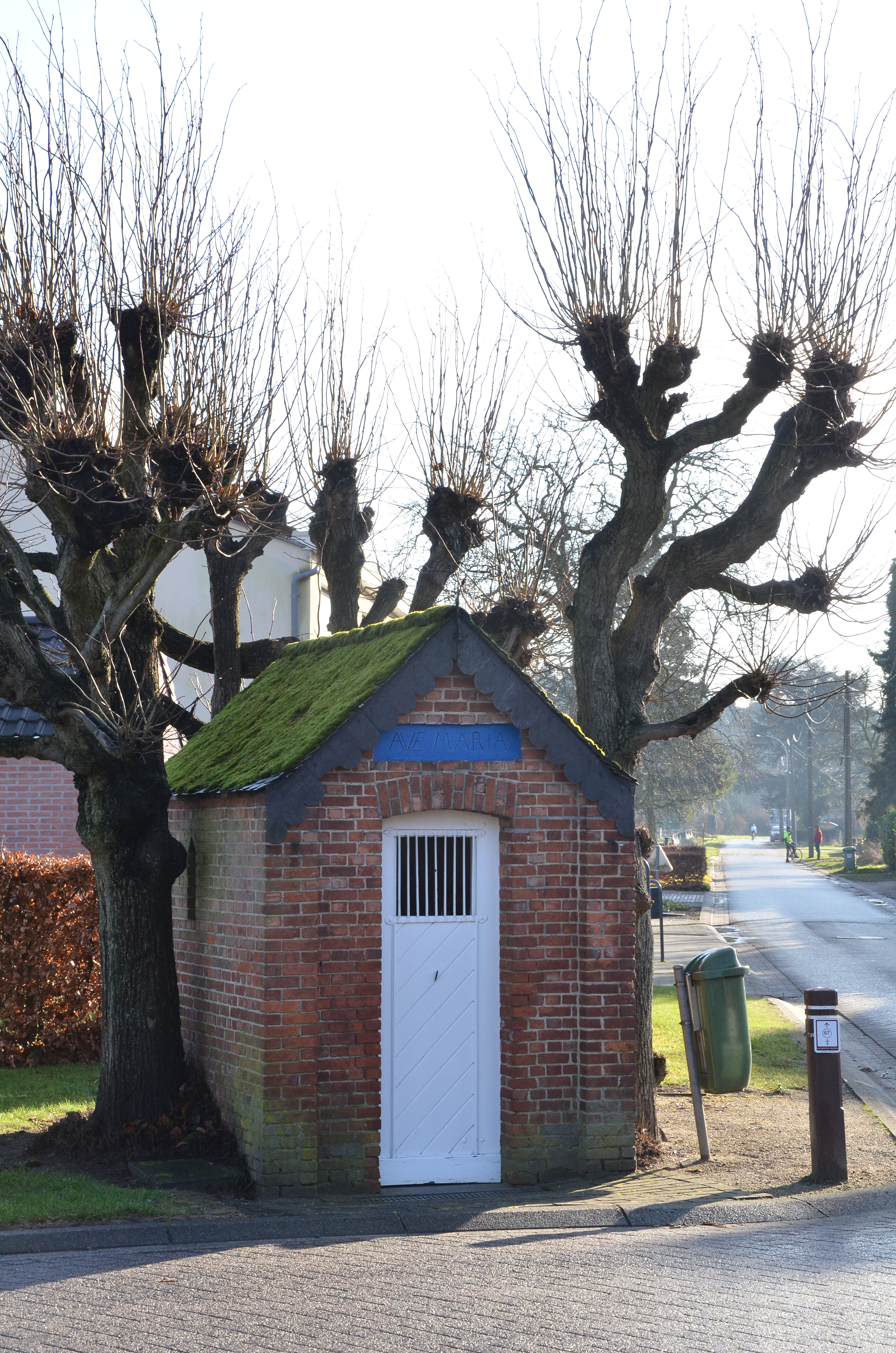 Kapelletje op hoek Maalderstraat en Boshovensebaan, Pulle